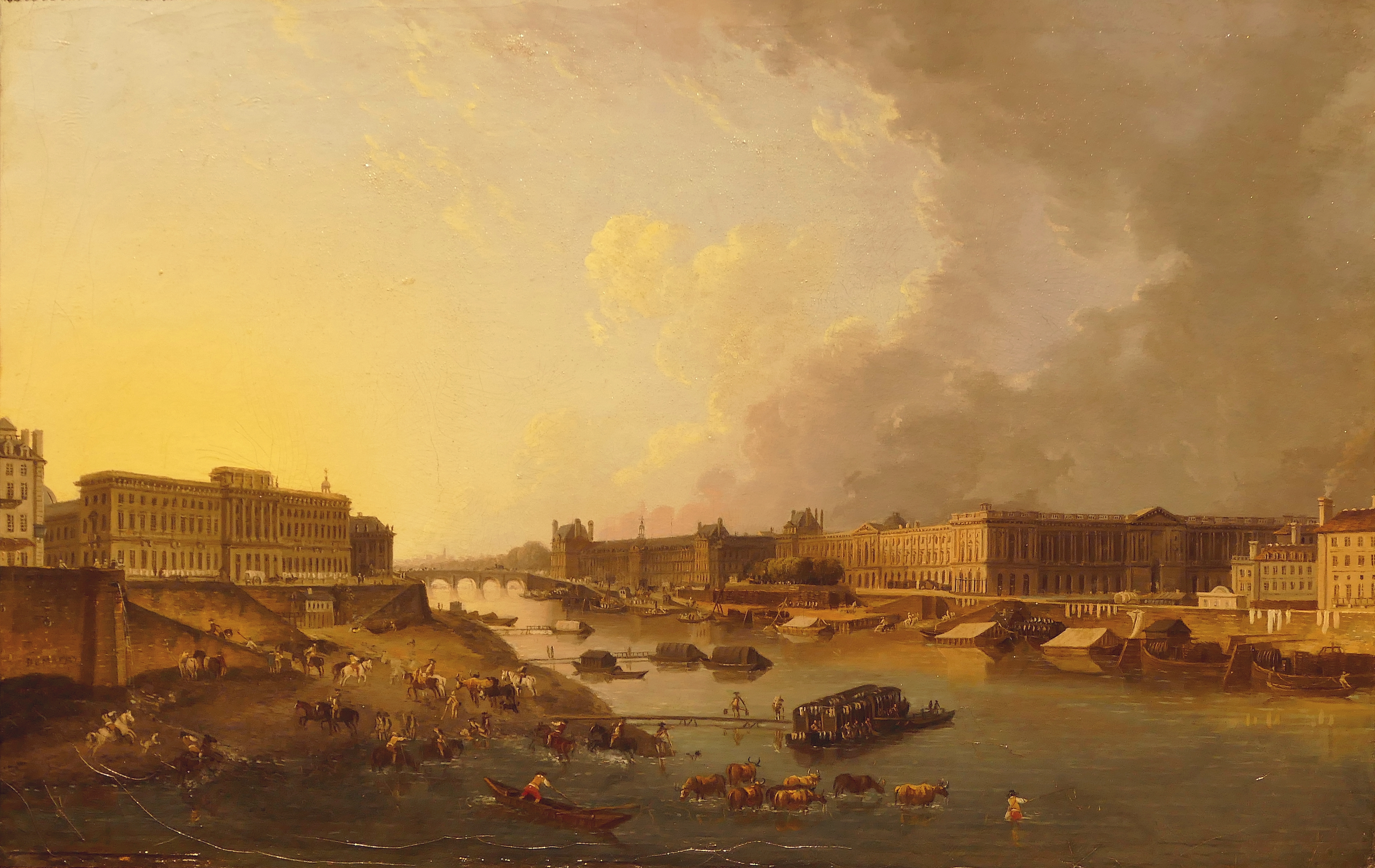 Pierre-Antoine Demachy, huile sur toile, 1783. Vue de la Seine en aval du Pont-Neuf, à gauche l'Hôtel des Monnaies, à droite Le Louvre. Largeur environ 60 cm. Musée de la Monnaie, 11 quai de Cont, Paris. Ref : PEINT 000006.